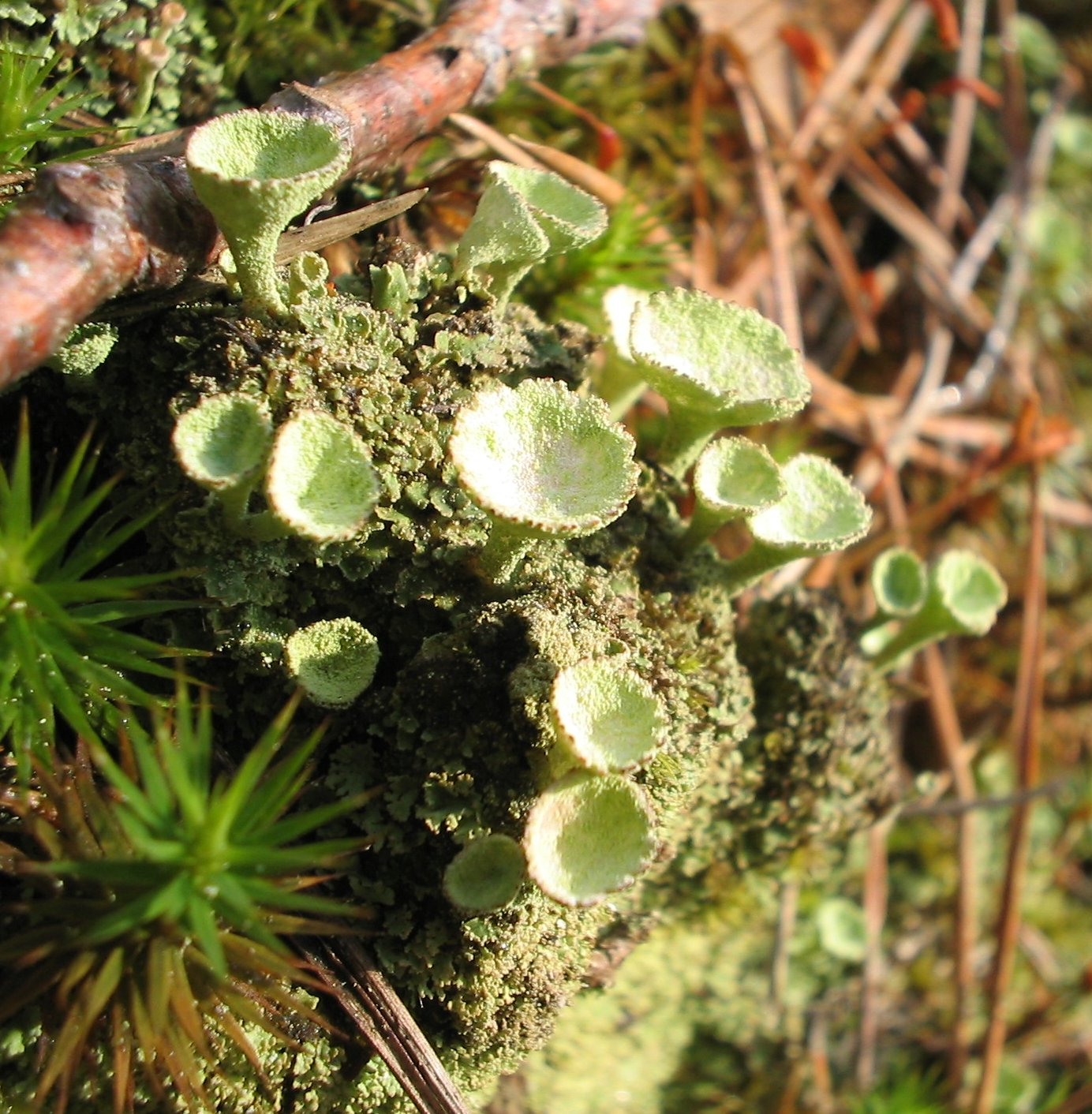 Trompetenflechte (Cladonia-fimbriata)Fotografiert in Wachau, Niederösterreich (Austria)